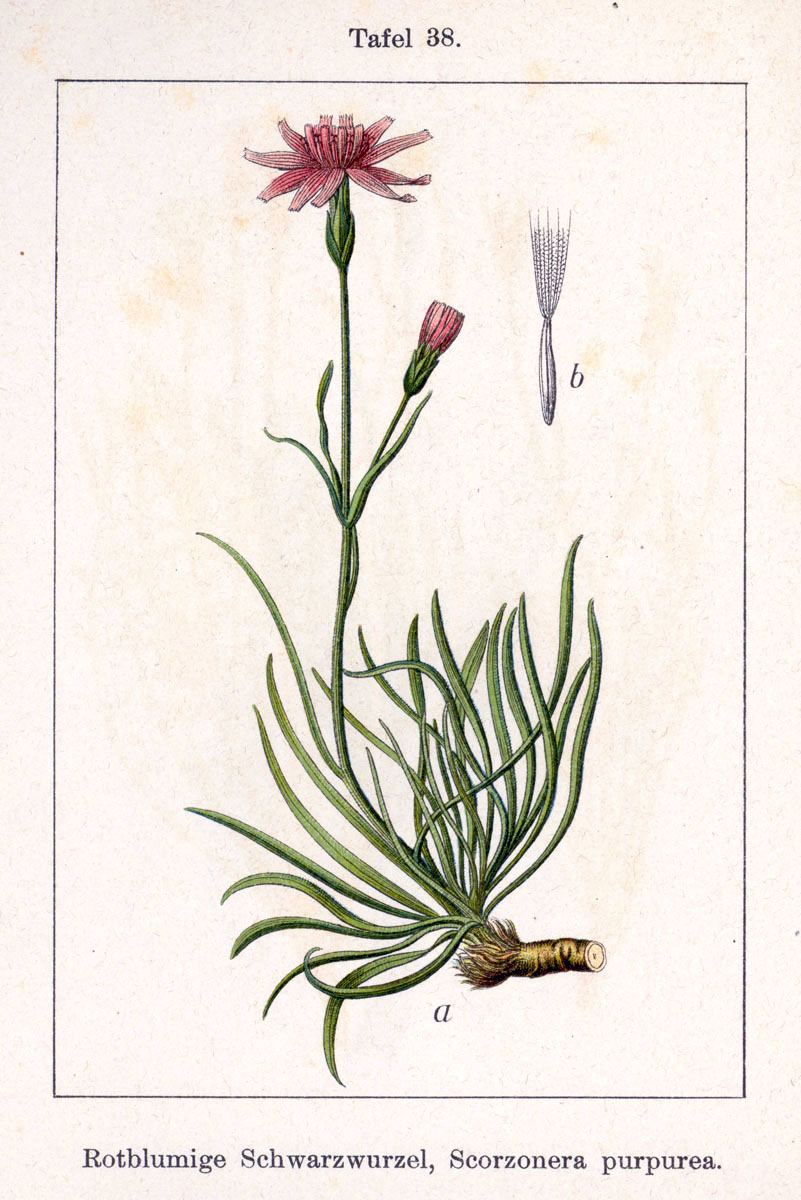 Scorzonera purpurea L. Original Description "Rotblumige Schwarzwurzel", Scorzonera purpurea